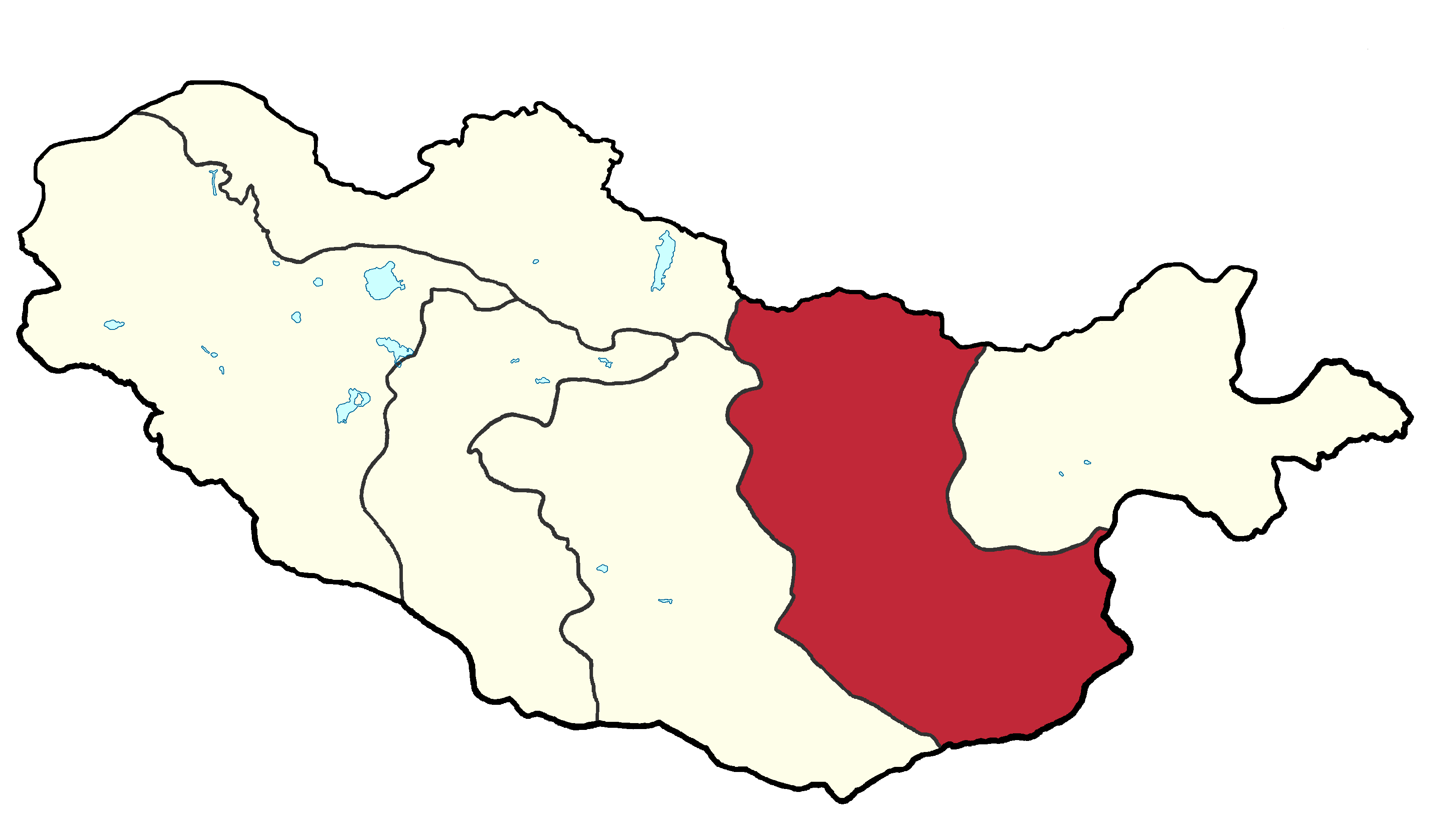 Монгол: Түшээт хан аймаг